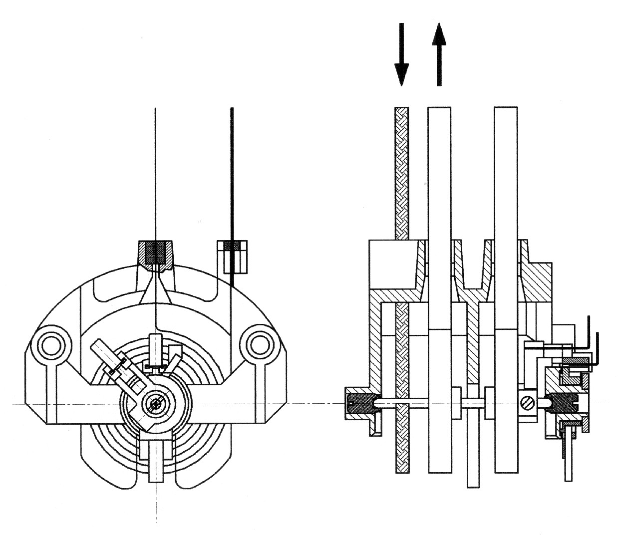 Ikerfémes mérőmű hőkompenzációval